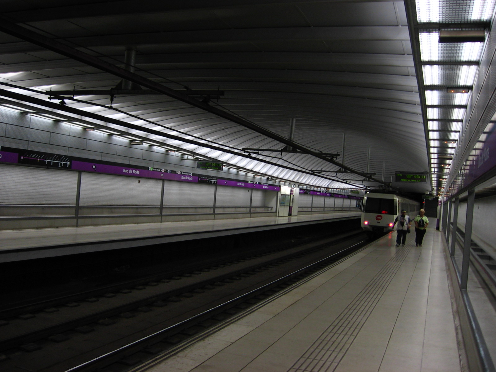 Platform of Bac de Roda station, Barcelona Metro/Andana de l'estació Bac de Roda, Barcelona